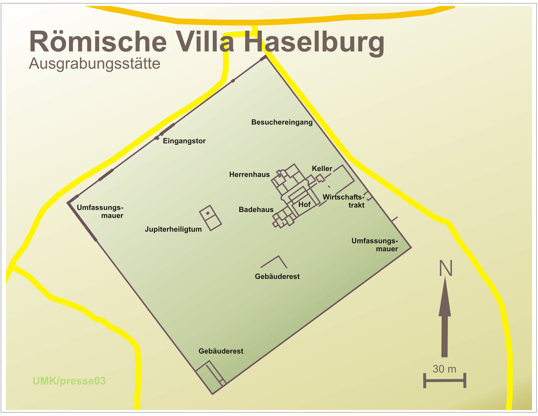 Übersichtskarte der Ausgrabungsfläche der Römischen Villa Haselburg im Odenwald, Hessen